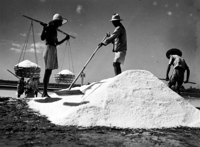 Repronegatief. Zoutwinning op Madura. Het zout wordt in hopen met een vastgesteld profiel op koraalsteen (karang) te drogen gelegd. Per oogst wordt er één zouthoop per tafel opgemaakt. Aan de hand van de lengte van de zouthoop wordt de omvang van de oogst vastgesteld